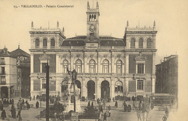 Ayuntamiento - Valladolid - Sello: Postales Zapatero. Valladolid - Tarjeta postal 140 x 90 B/N